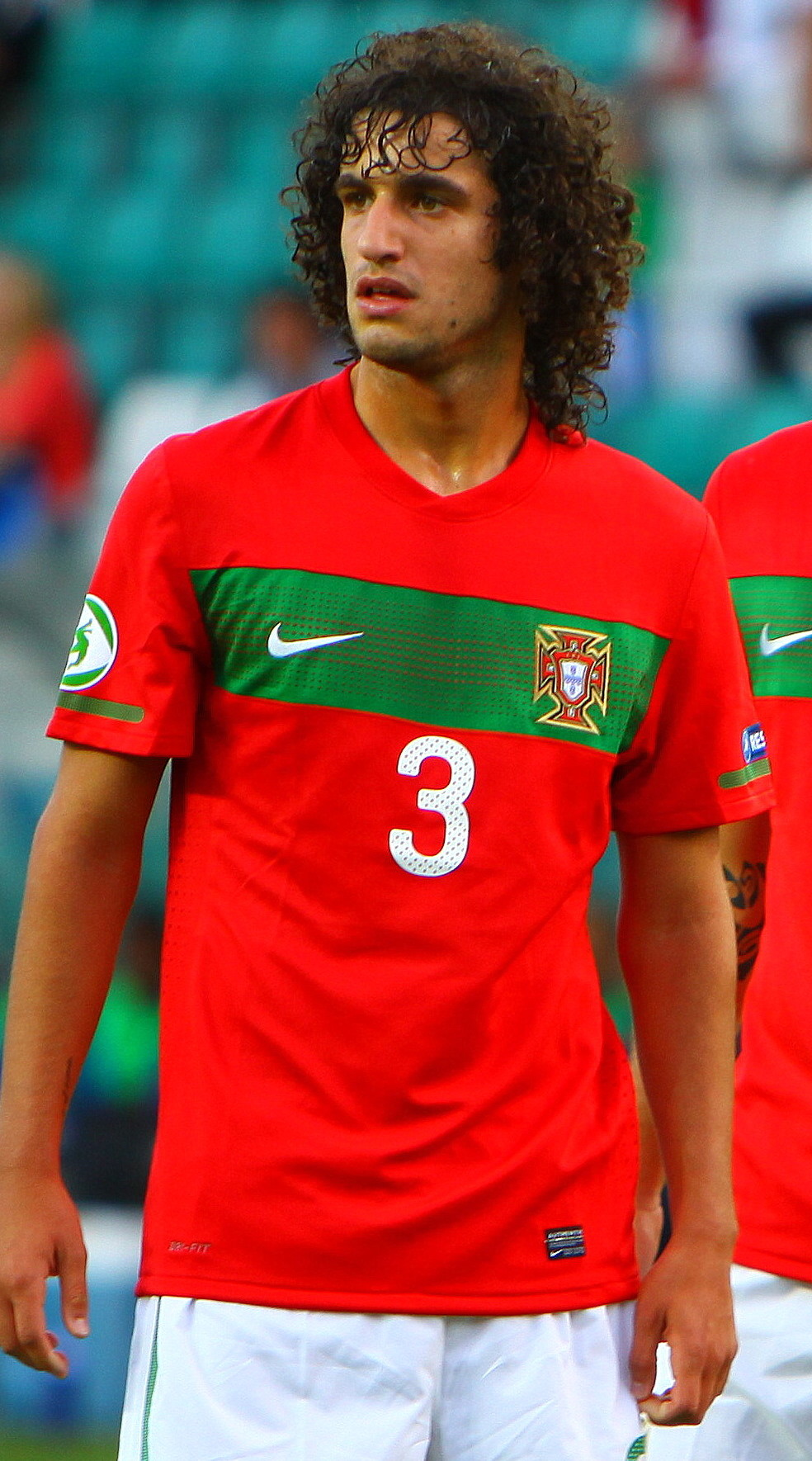 Tiago Ferreira, Daniel Martins